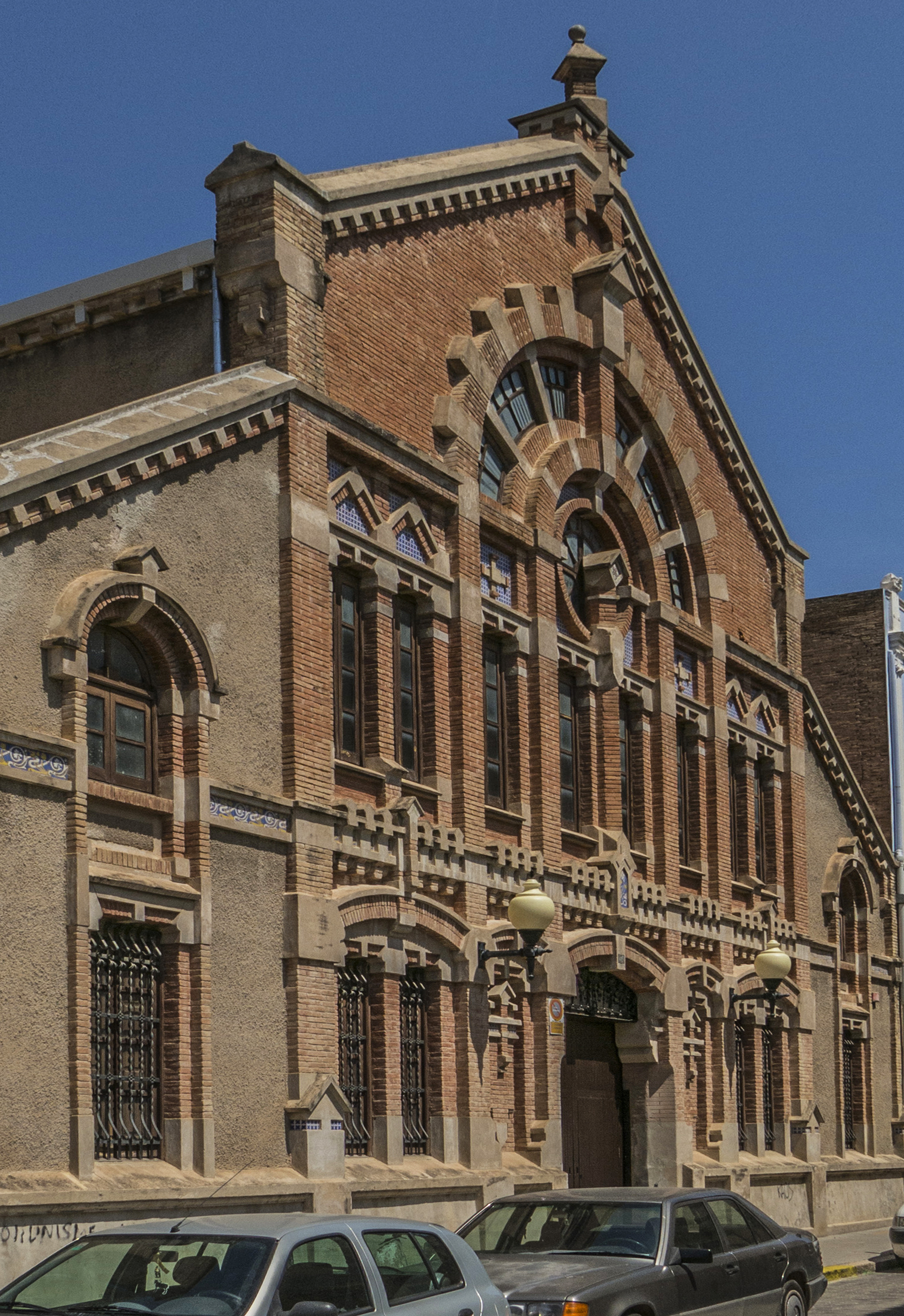 Es pensa que es va construir entre 1905 i 1910. La planta de l'edifici adopta la forma de "L". La construcció està inspirada en la tipologia basilical, amb una nau central de dimensions més grans i més alta, i unes naus laterals més estretes i no tan elevades com la central, i que permeten la il·luminació zenital. Hi ha també una sèrie de columnes de funció, que marquen la separació entre la nau central i les laterals.